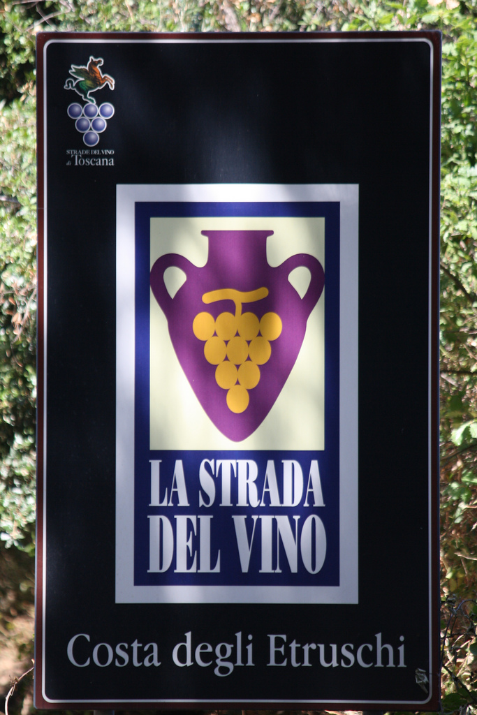 Costa degli Etruschi in Toscana - Italia.